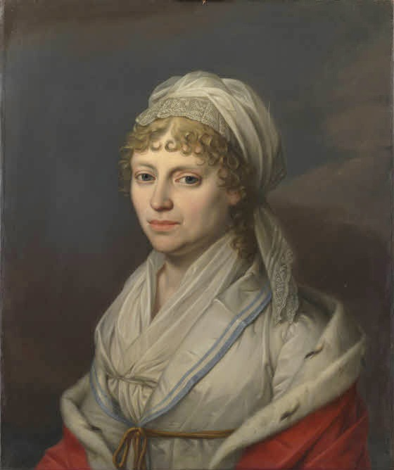 Wilhelmine Luise Christiane (1752-1805) war die Tochter Herzog Anton Ulrichs zu Sachsen-Meiningen und die Gemahlin von Adolf Landgraf von Hessen-Philippsthal-Barchfeld (1743-1803)